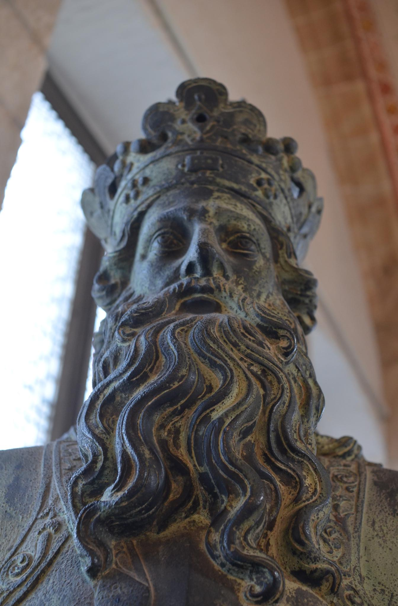 Rathaus Aachen